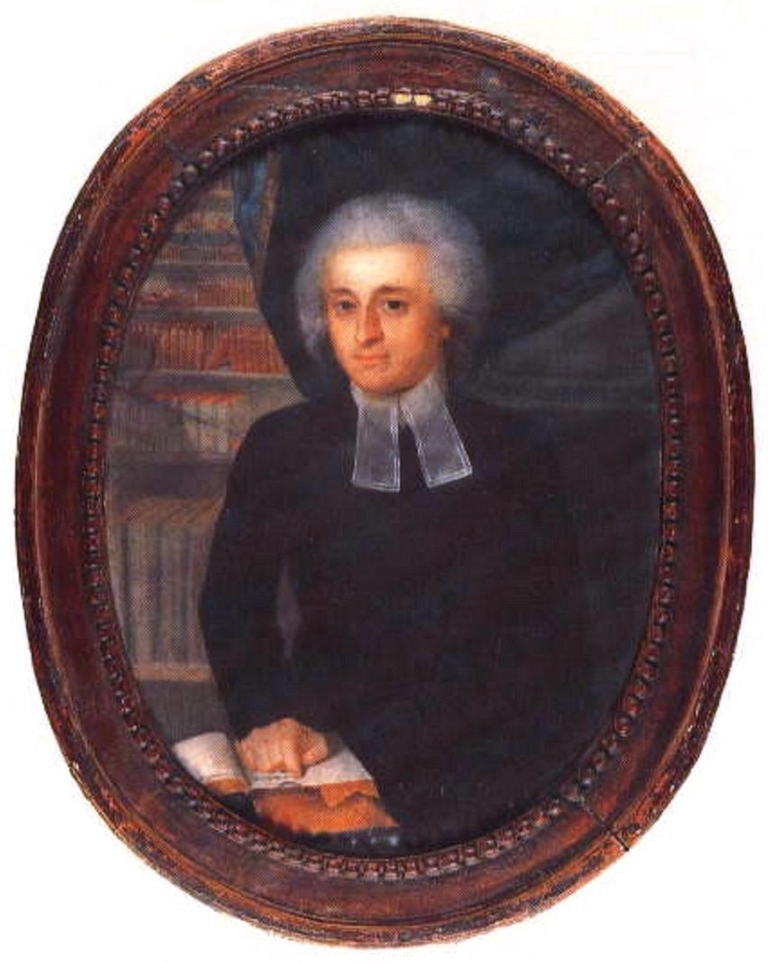 Portrait présumé de Fleury Mesplet (1734-1794).